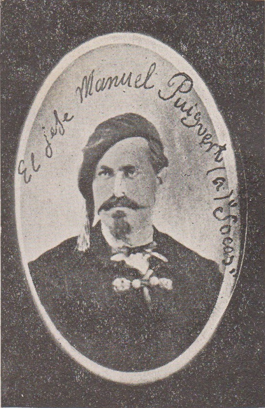 El jefe Manuel Puivert (a.) "Socas"